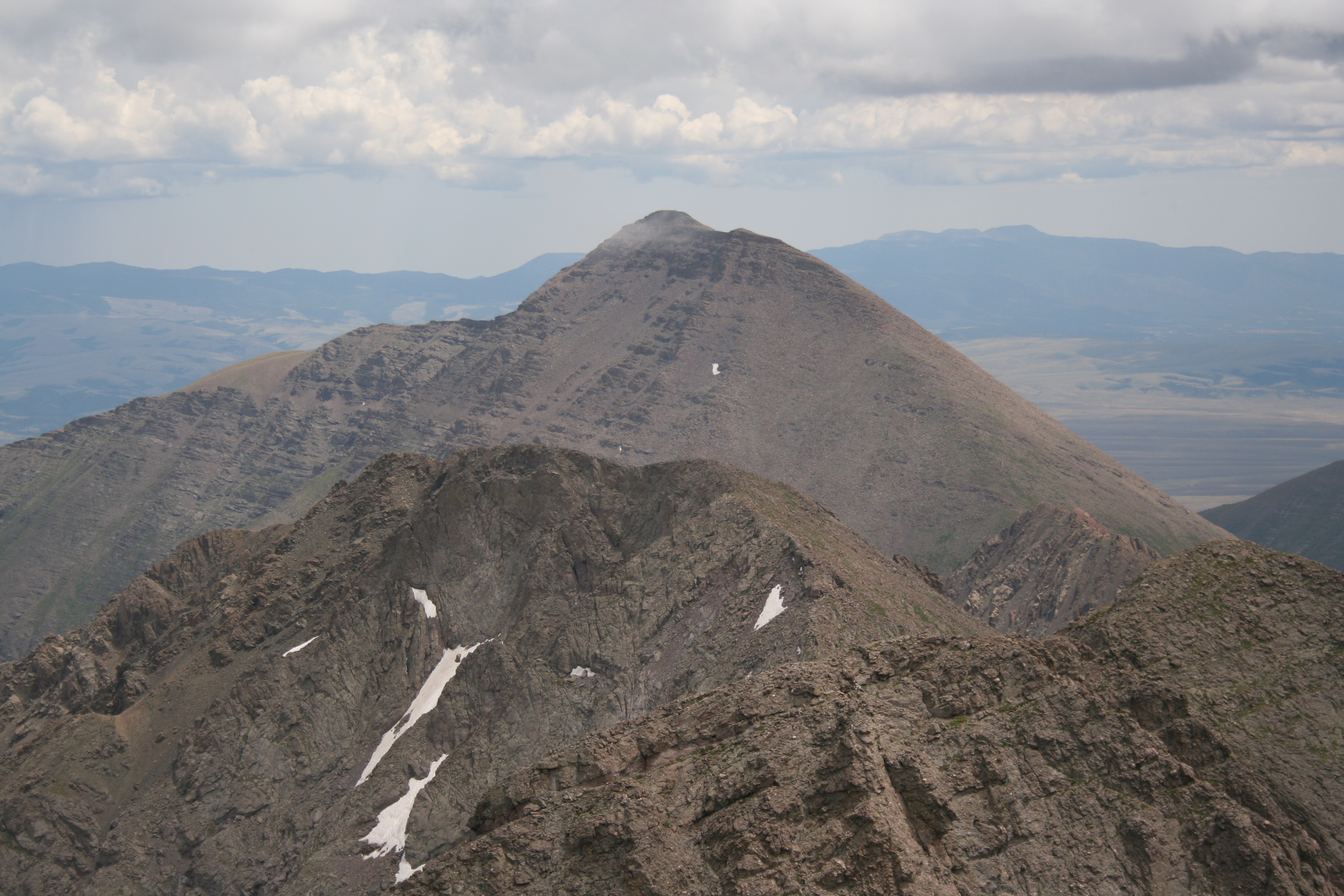 Humboldt Peak seen from Kit Carson peak